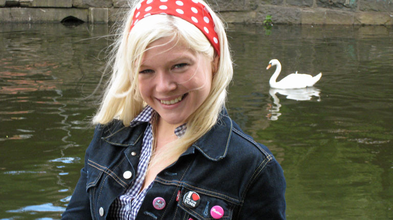 Caroline Andersen